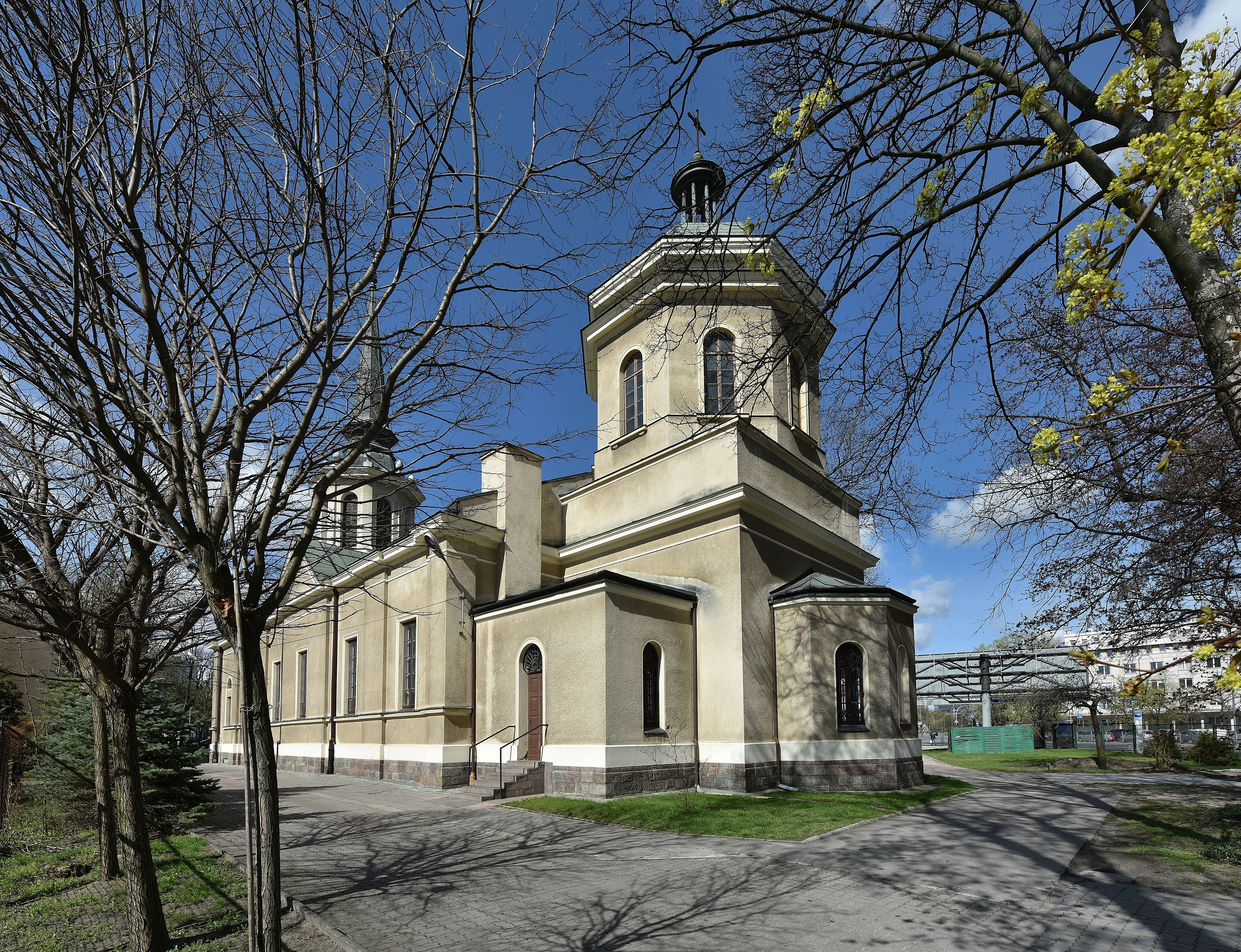 Kościół Wniebowstąpienia Pańskiego w Warszawie (ewangelicko-augsburski) w Warszawie